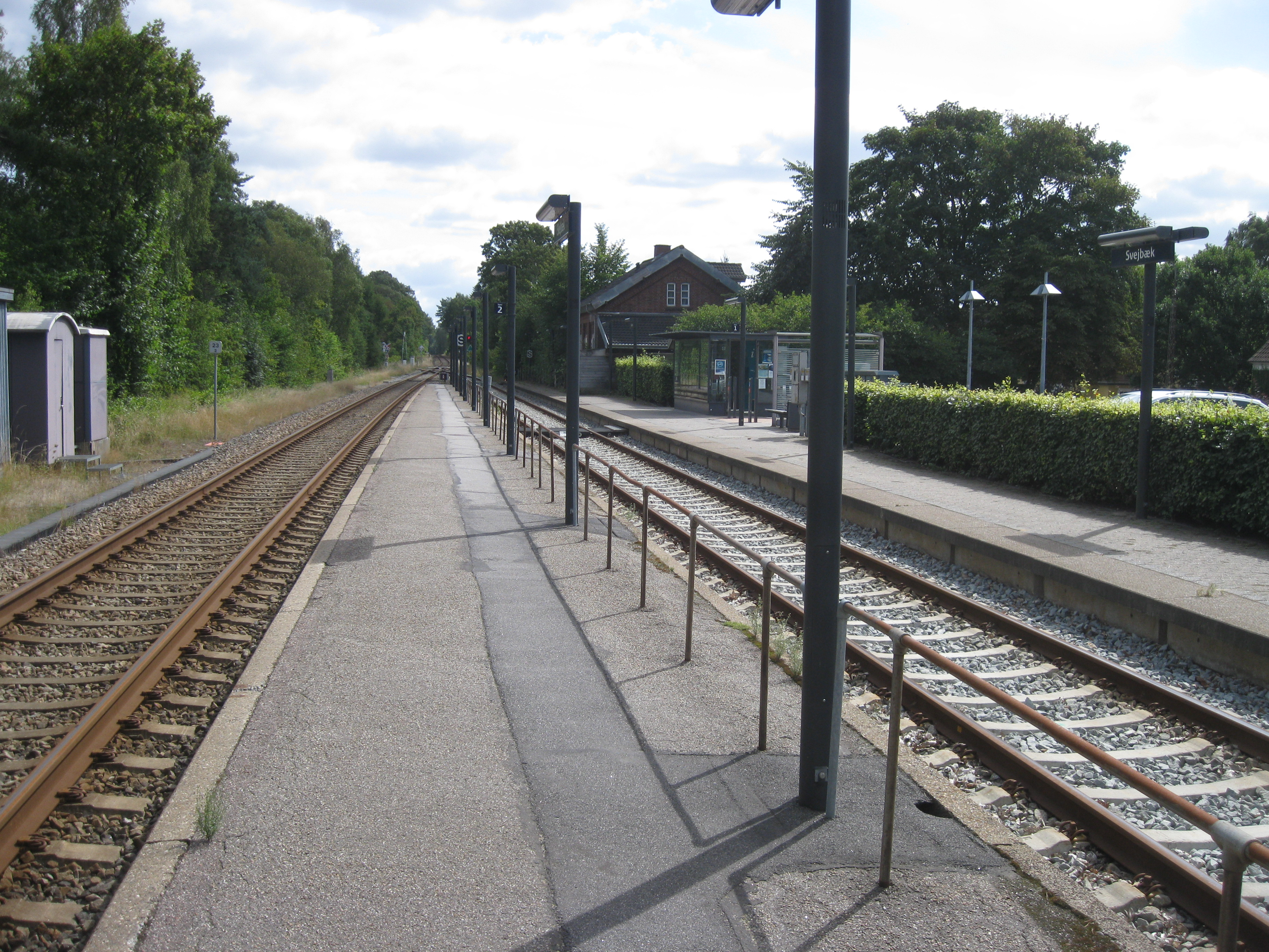 Svejbæk Station